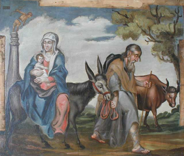 Уцёкі ў Егіпет. Другая палова XVII ст. З брыгіцкага касцёла ў Гродне. Нацыянальны мастацкі музей Беларусі